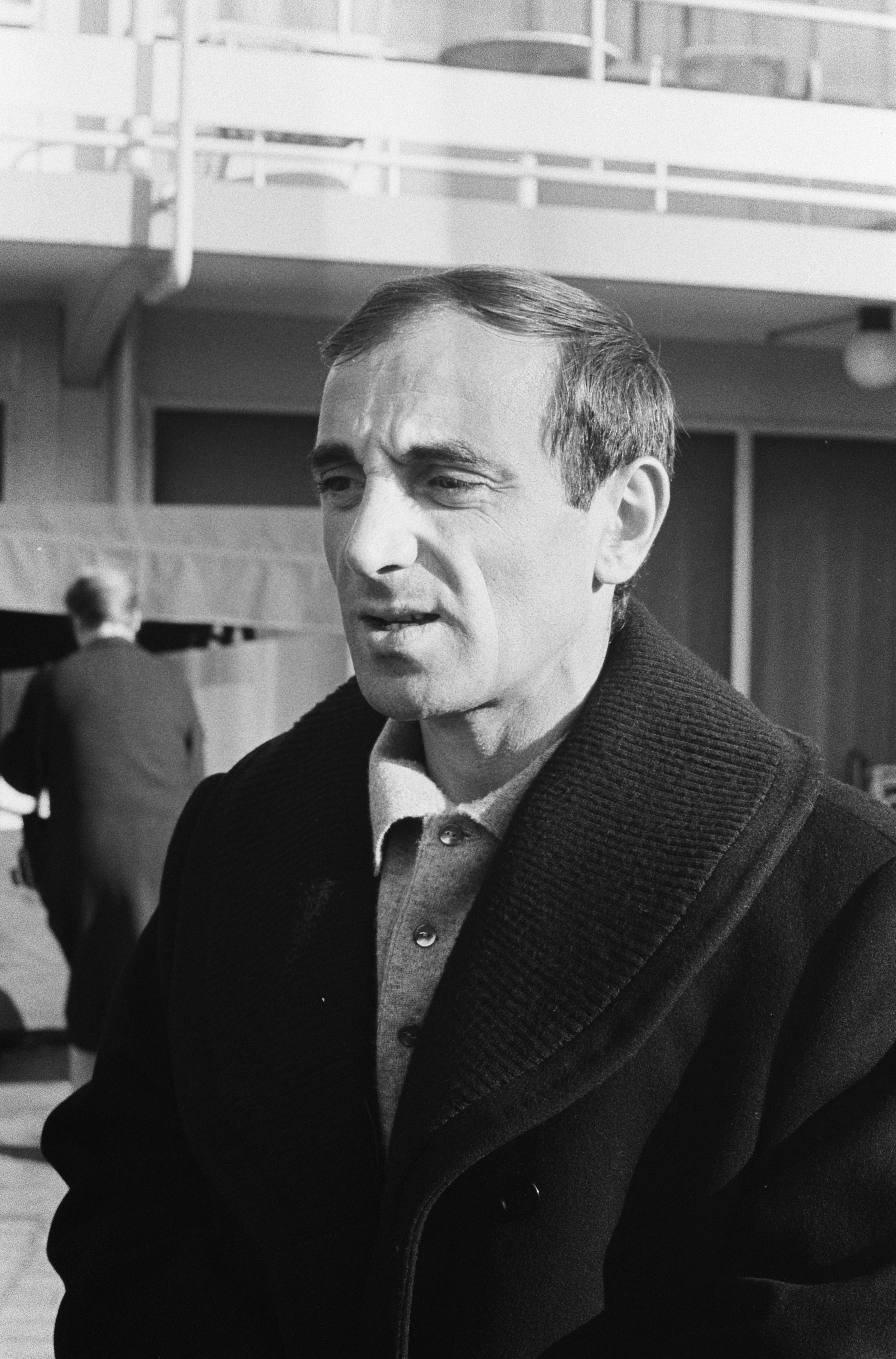 Collectie / Archief : Fotocollectie Anefo Reportage / Serie : [ onbekend ] Beschrijving : Charles Aznavour geeft een persconferentie in Hotel Gooiland in verband met zijn optreden Datum : 15 mei 1963 Locatie : Hilversum, Noord-Holland Trefwoorden : portretten Persoonsnaam : Aznavour, Charles Fotograaf : Gelderen, Hugo van / Anefo Auteursrechthebbende : Nationaal Archief Materiaalsoort : Negatief (zwart/wit) Nummer archiefinventaris : bekijk toegang 2.24.01.05 Bestanddeelnummer : 915-1666